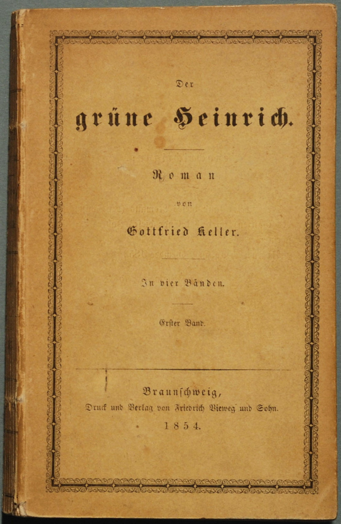 Keller, Gottfried: Der grüne Heinrich. Roman. Erster Band. Braunschweig: F. Viehweg und Sohn 1854, 396 Seiten. Erstdruck Wilpert/Gühring² 9.